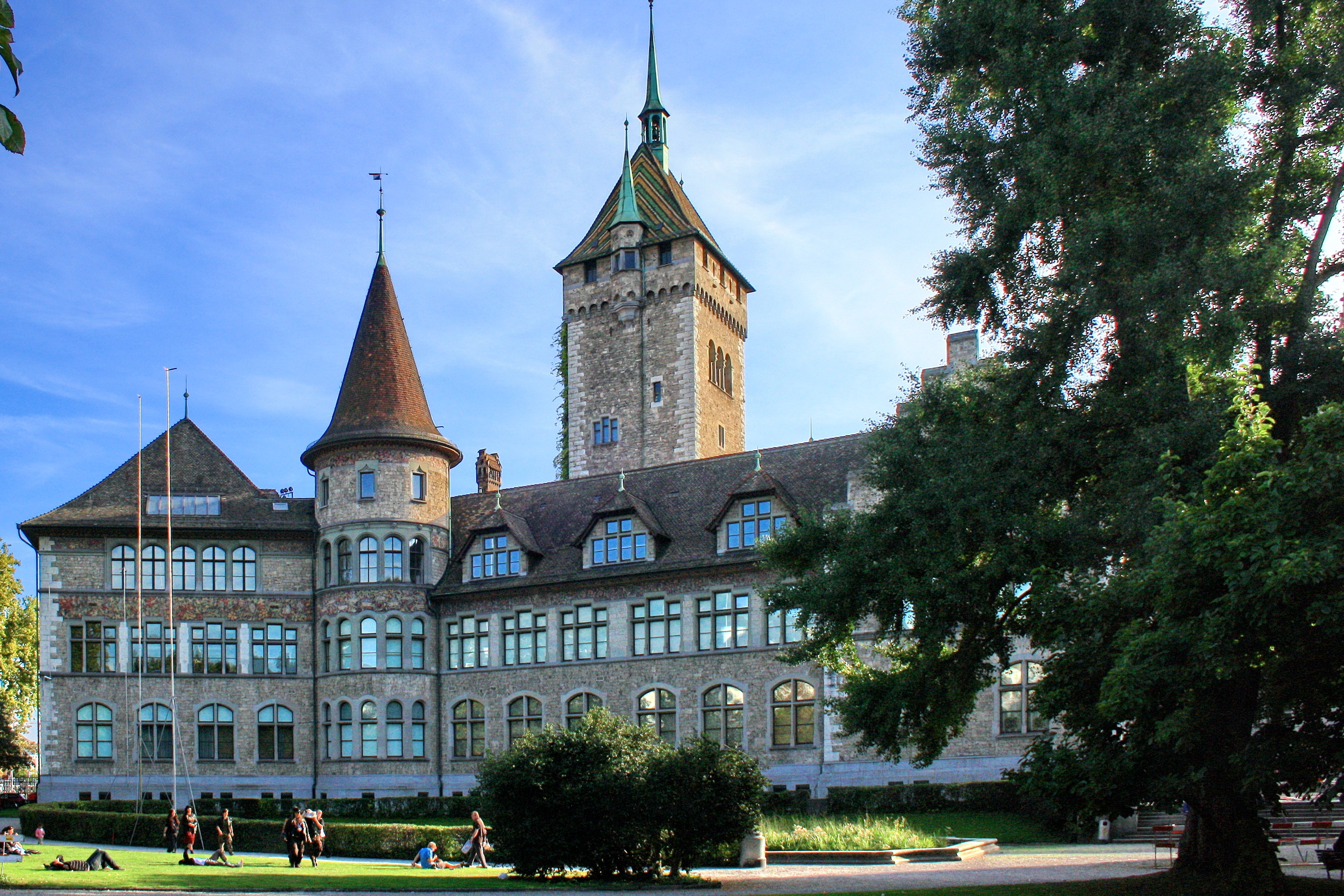 Landesmuseum in Zürich (Switzerland) as seen from Platzspitz park